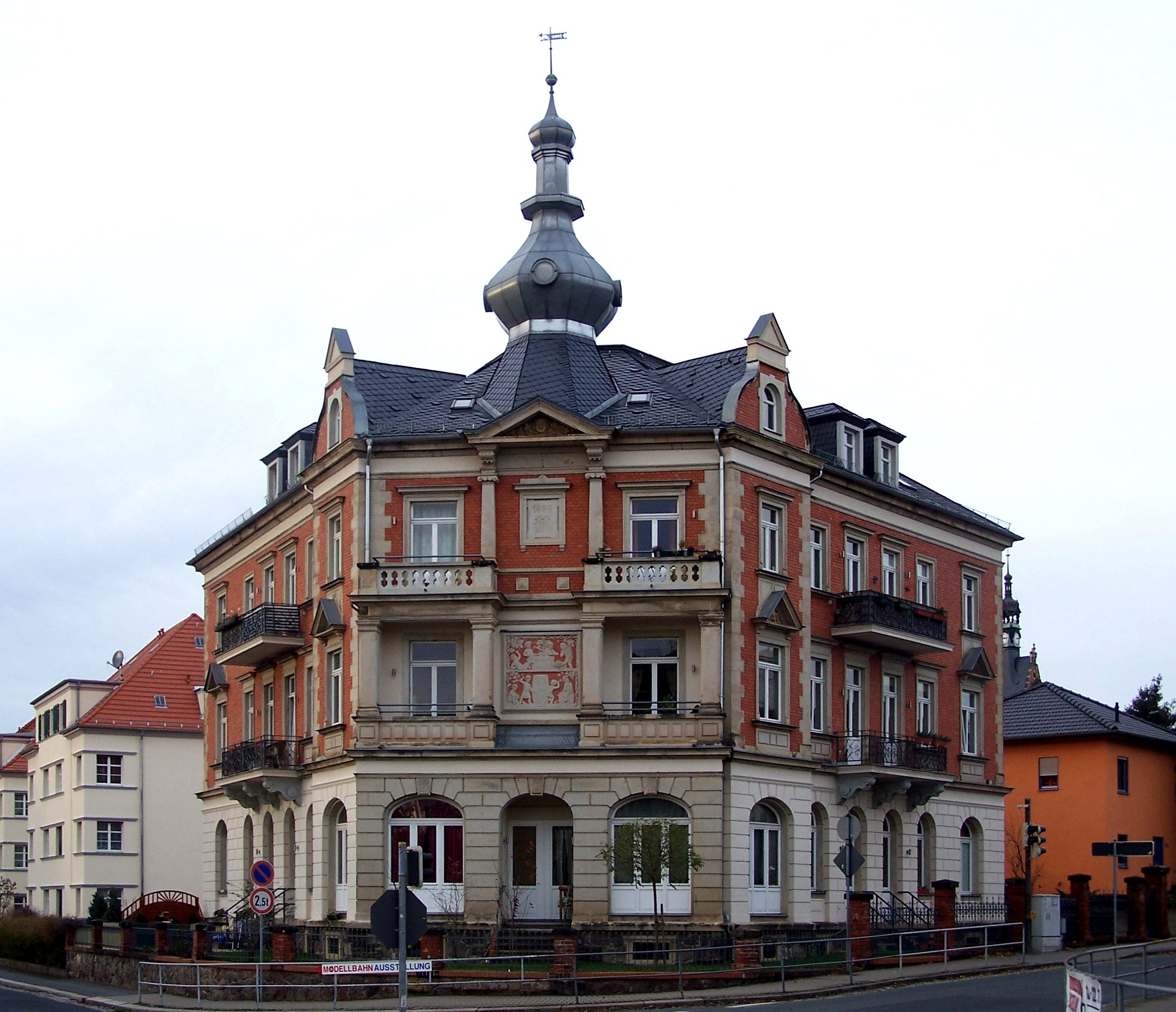 Schildenstr. 17 (Knötzsch's Weinstuben)